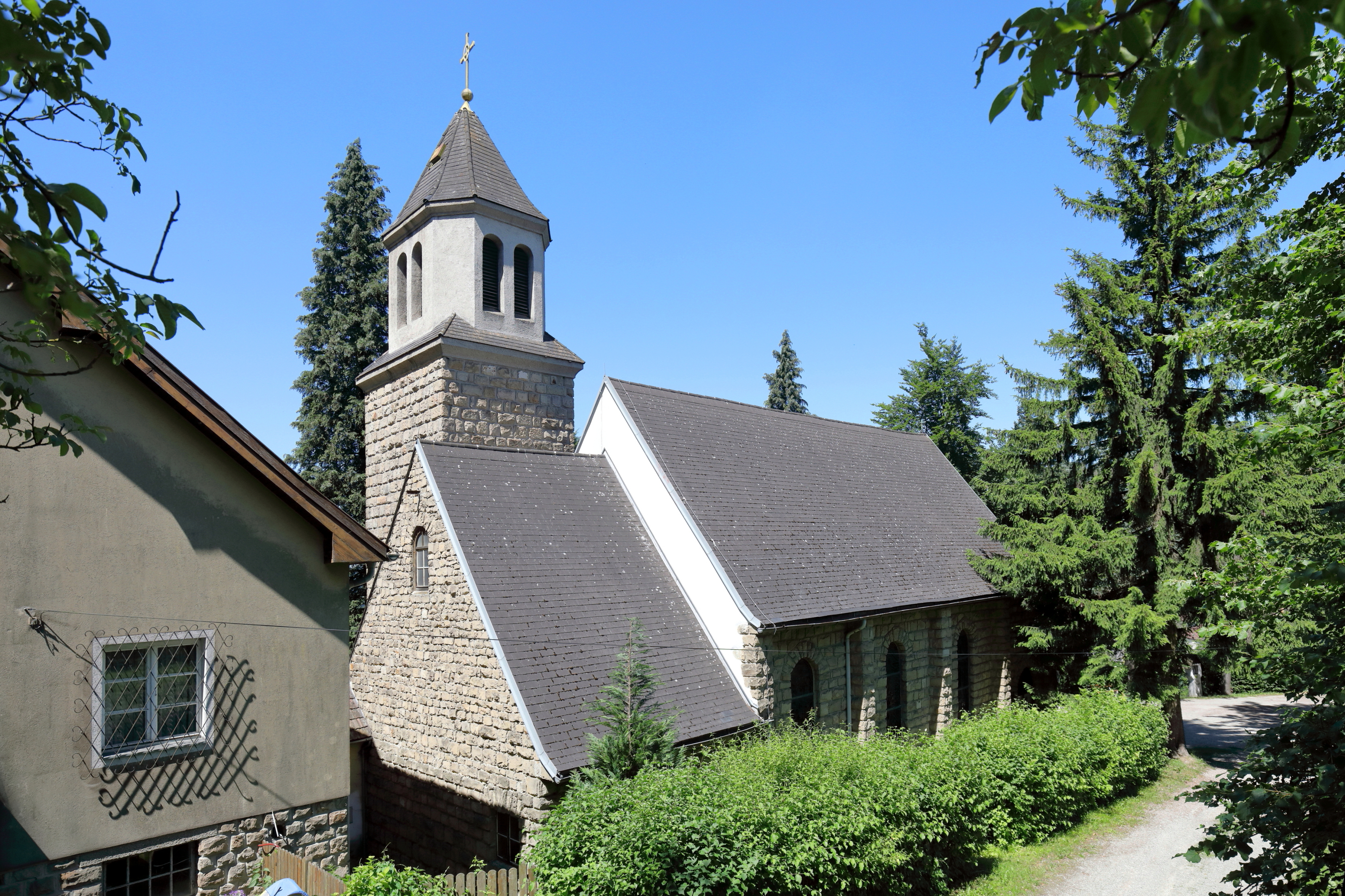 Ostansicht der Dollfuß-Gedächtniskirche hl. Theresia vom Kinde Jesu in Rekawinkel, ein Ortsteil der niederösterreichischen Stadtgemeinde Pressbaum. Der freistehende Kleinkirchenbau mit eingezogenem niedrigerem Chor und südlichem Chorwinkelturm wurde ab Herbst 1933 errichtet und am 20. Oktober 1935 von Kardinal Theodor Innitzer geweiht. 1951 erfolgte die Erhöhung des Turmes und chorseitig der Pfarrhof errichtet. 1952 wurde Rekawinkel eine eigenständige Pfarre.